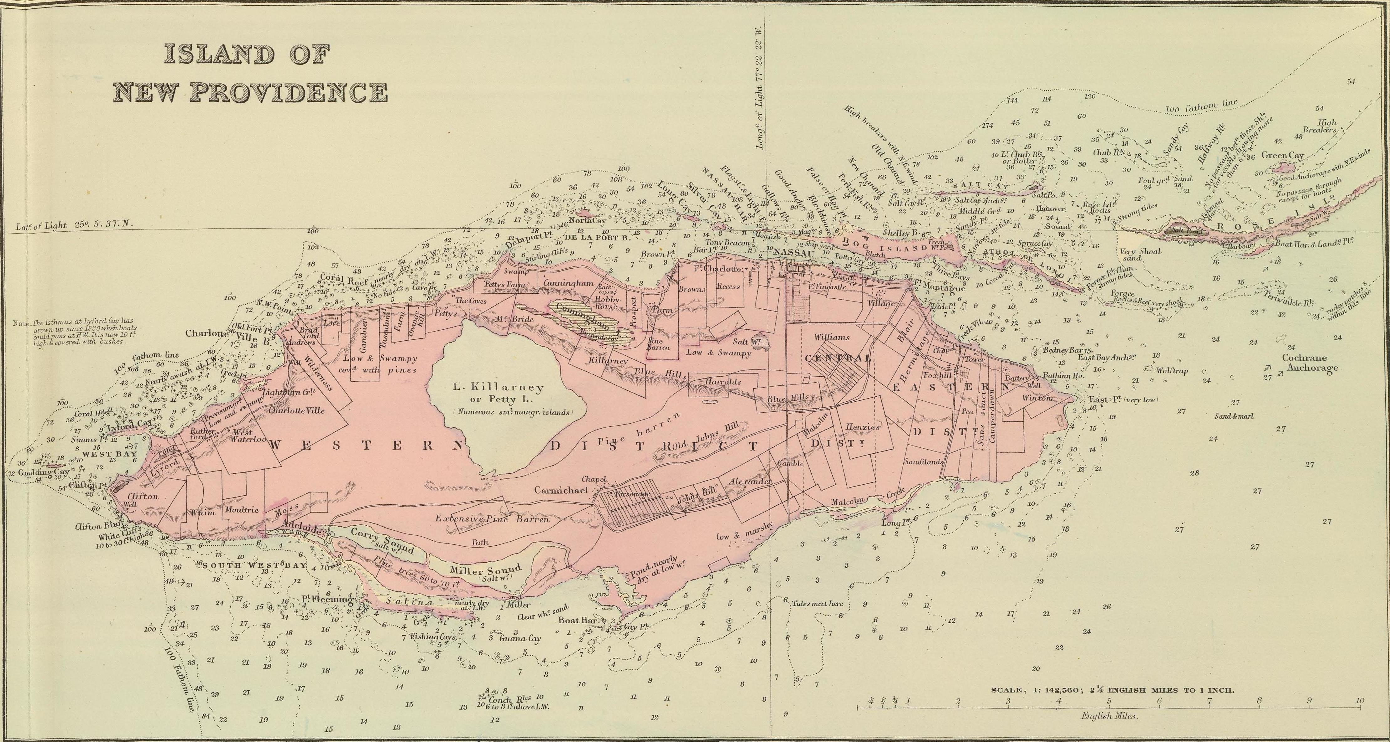 Atlaskarte der Bahamas